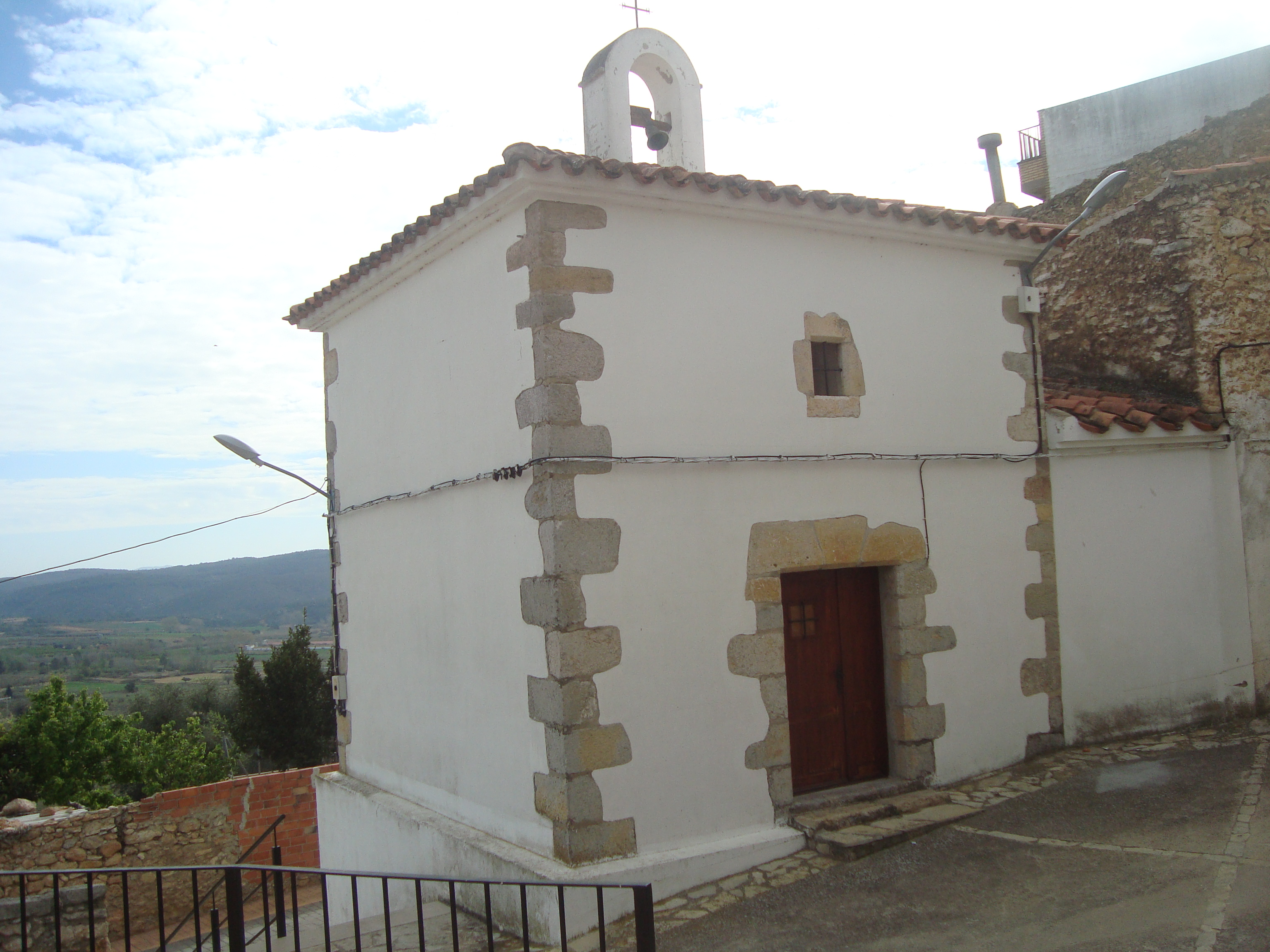 Ermita de la Mare de Déu de la Font 05.120-002.